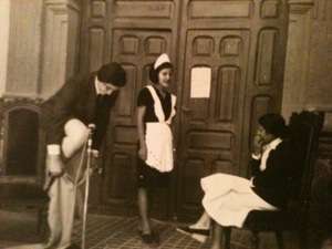 Los propios jóvenes de la localidad ponen en escena una obra teatral